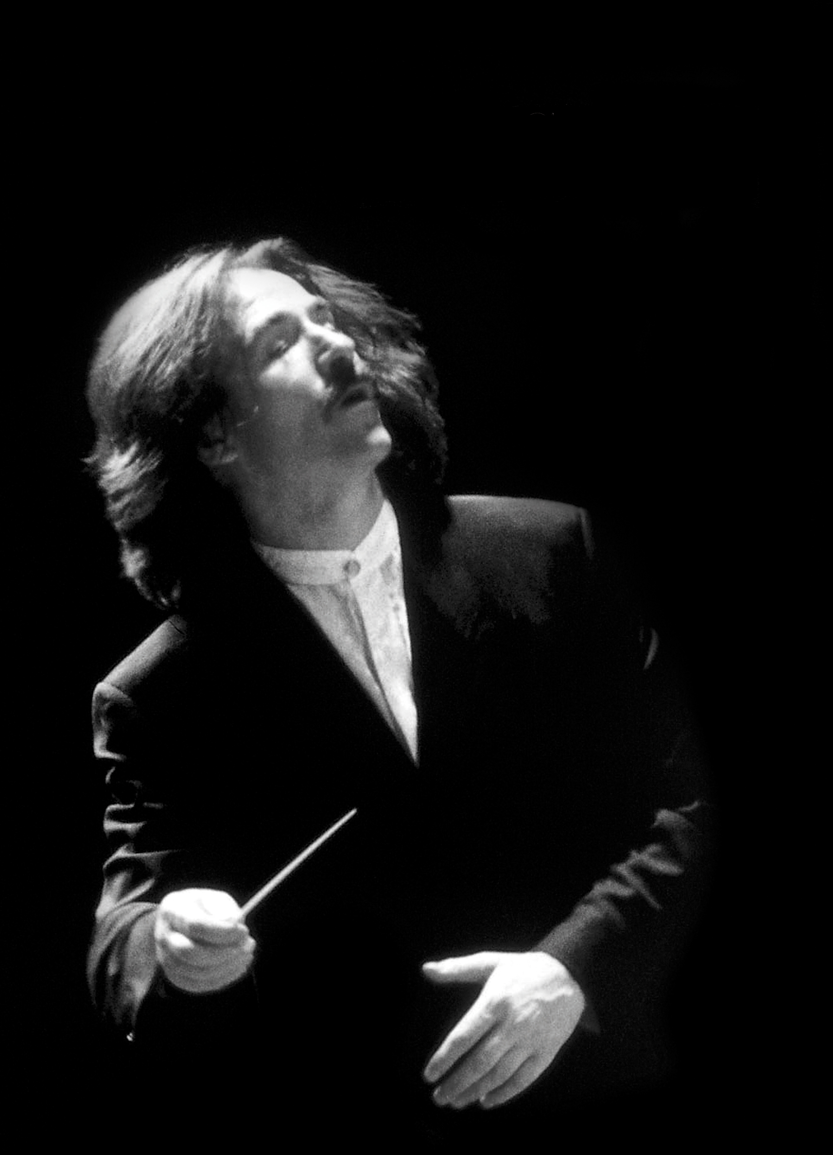 Luis Cobos en Japón